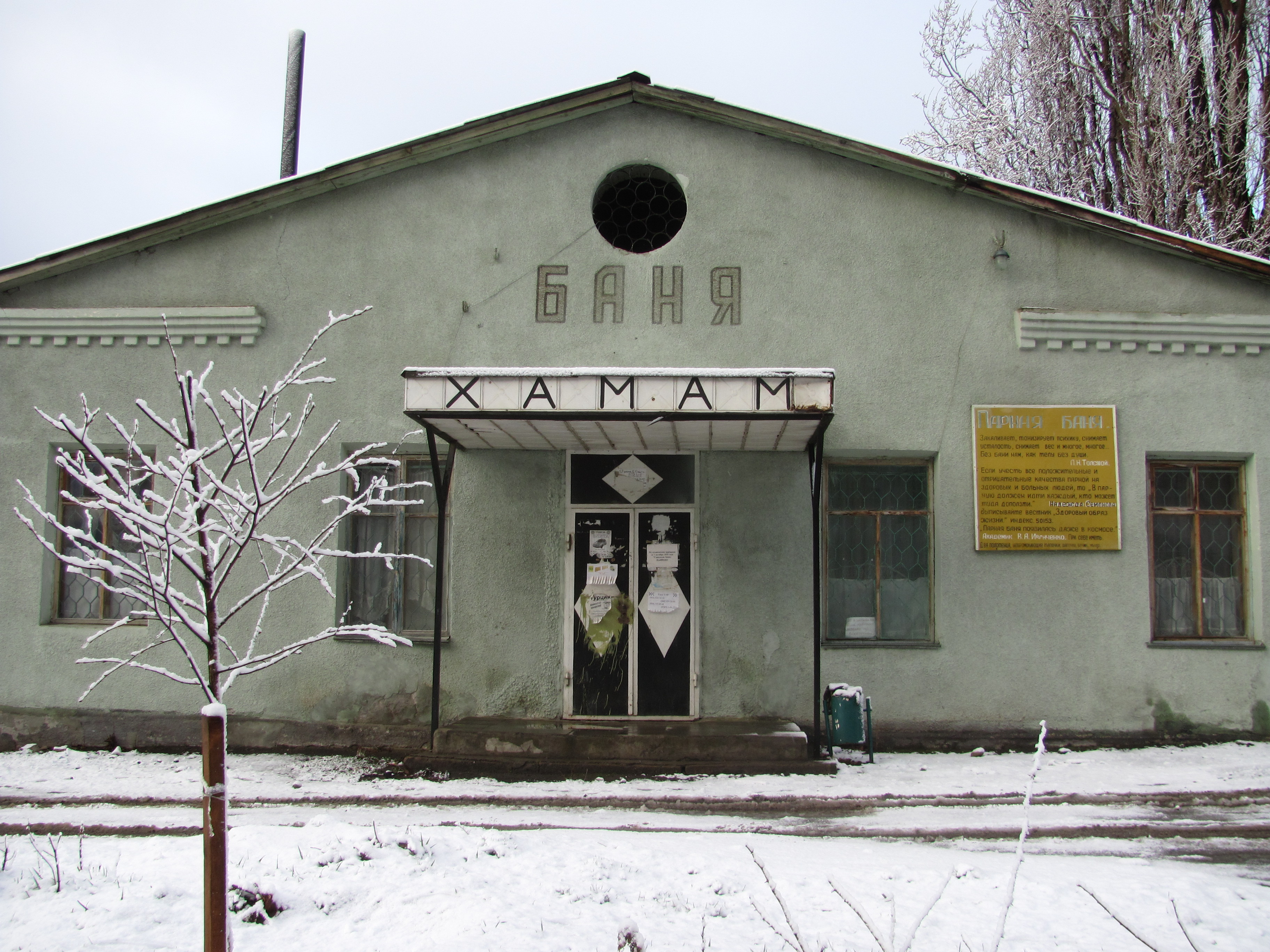 Publiczna bania parowa w Karaczajewsku, Północny Kaukaz, Rosja